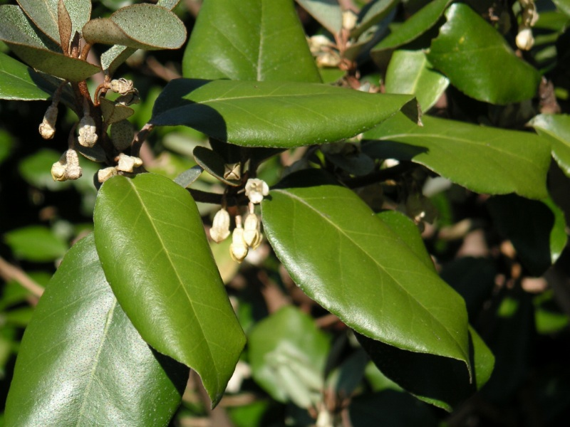 Elaeagnus × submacrophylla (syn. E. × ebbingei)